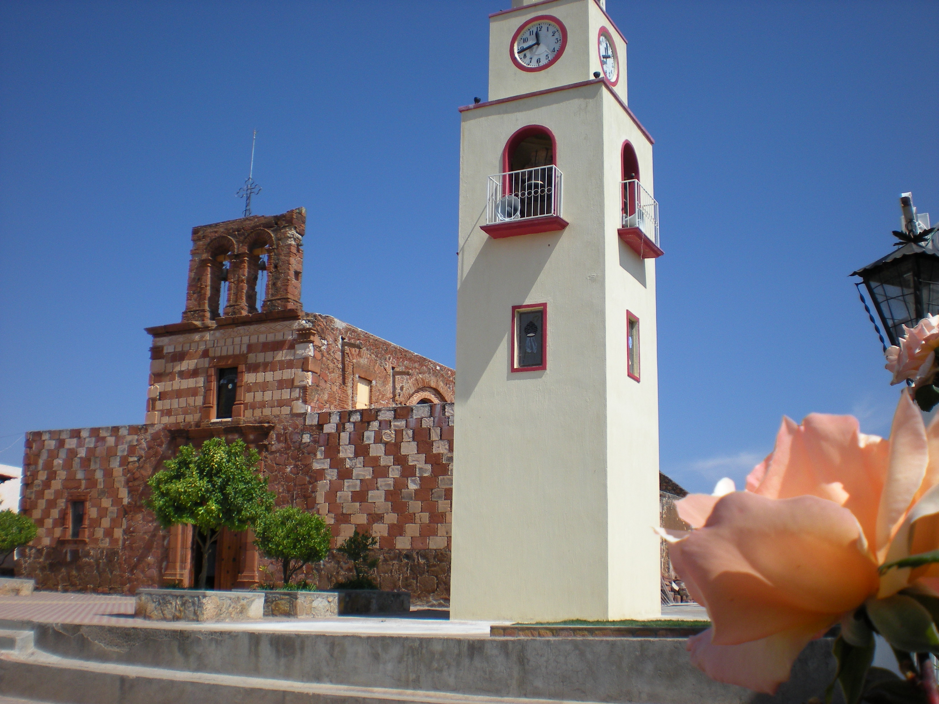 Templo de San Agustín